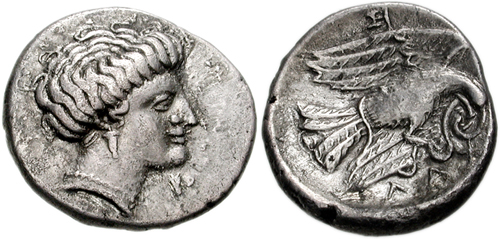 Chalkis silver Drachma, 338-308 BC